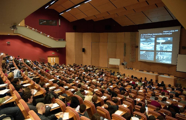 SZTE TIK kongresszus terem